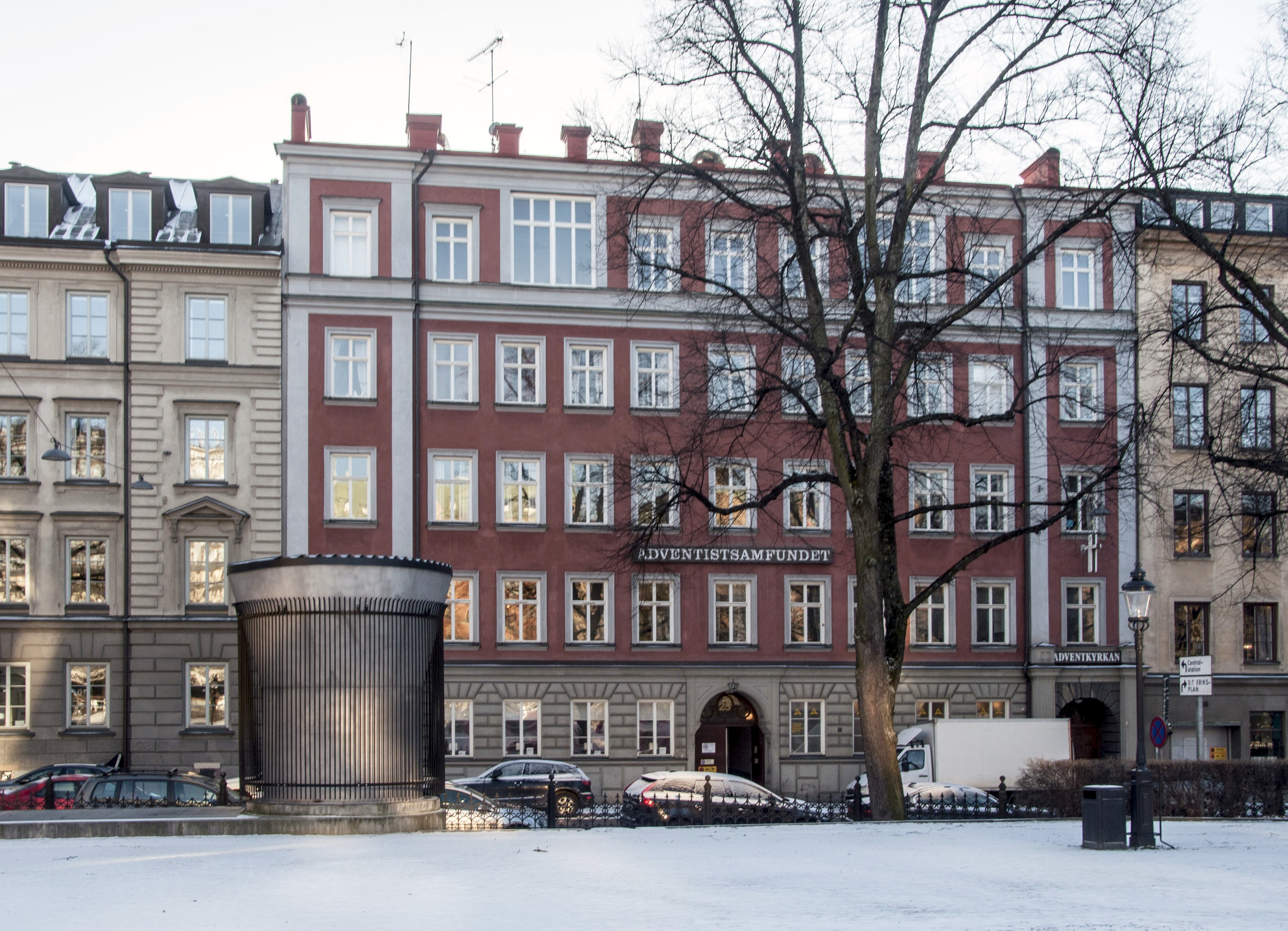 Sjundedags Adventistsamfundet, Olof Palmes gata 25 Stockholm. Lagern 9 Nybyggnadsår 1876 - 1876. Lars Magnus Elfling (Byggherre) Lars Magnus Elfling (Byggmästare) Oscar Eriksson (Arkitekt). Ombyggt 1923 då även kyrksal inreddes på innergården. Arkitekt Waldemar Johansson